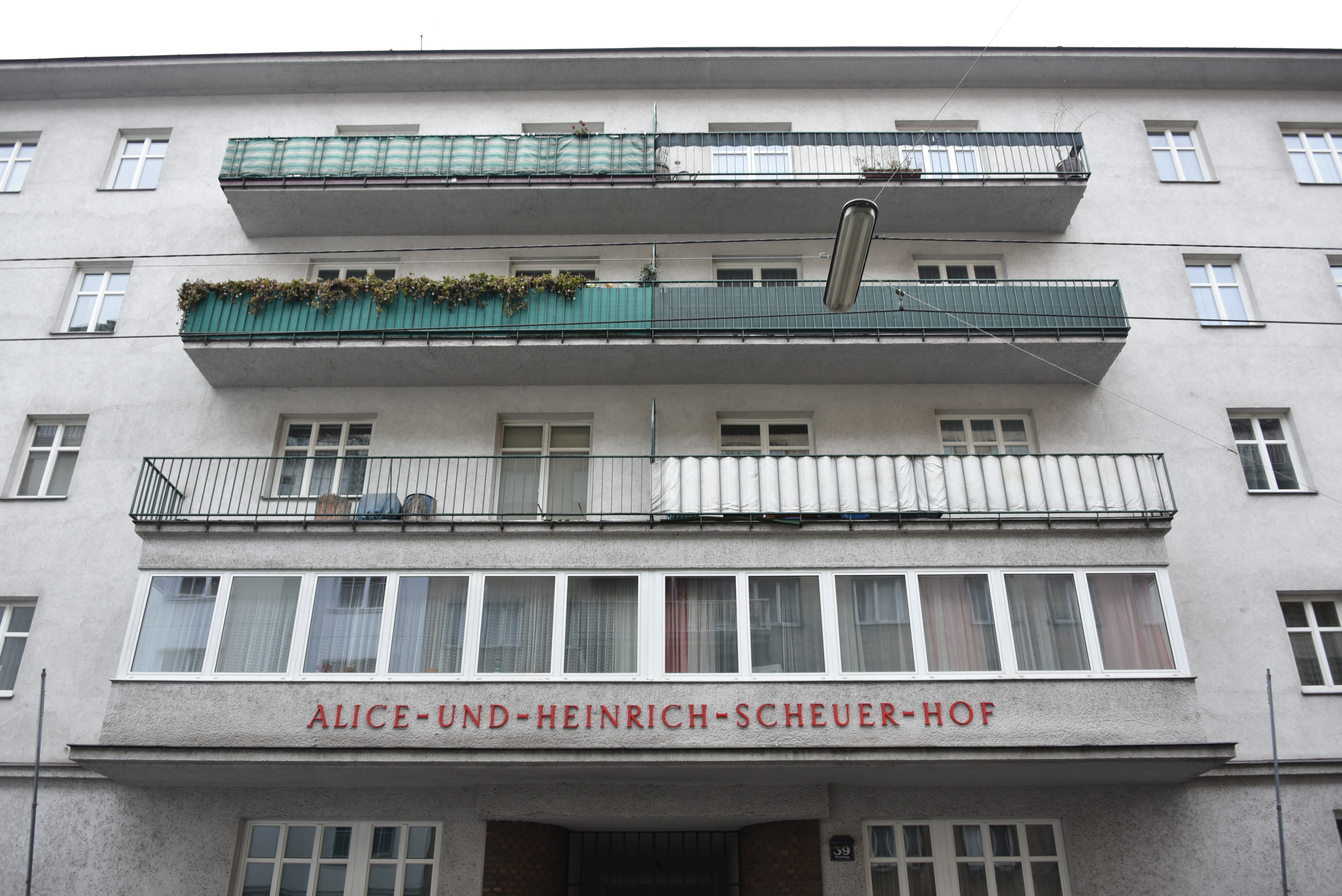 Alice-und-Heinrich-Scheuer-Hof in Wien-Landstraße This media shows the Vienna residential building (Gemeindebau) with the ID 442 (Alice-und-Heinrich-Scheuer-Hof).